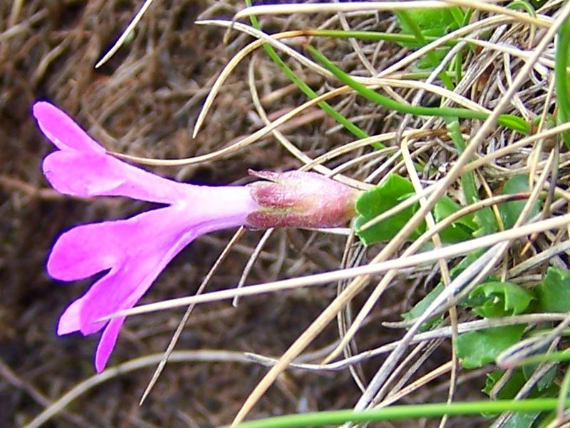 Primula minima (pierwiosnek maleńki), habitat: Tatra Mountains - Czerwone Wierchy